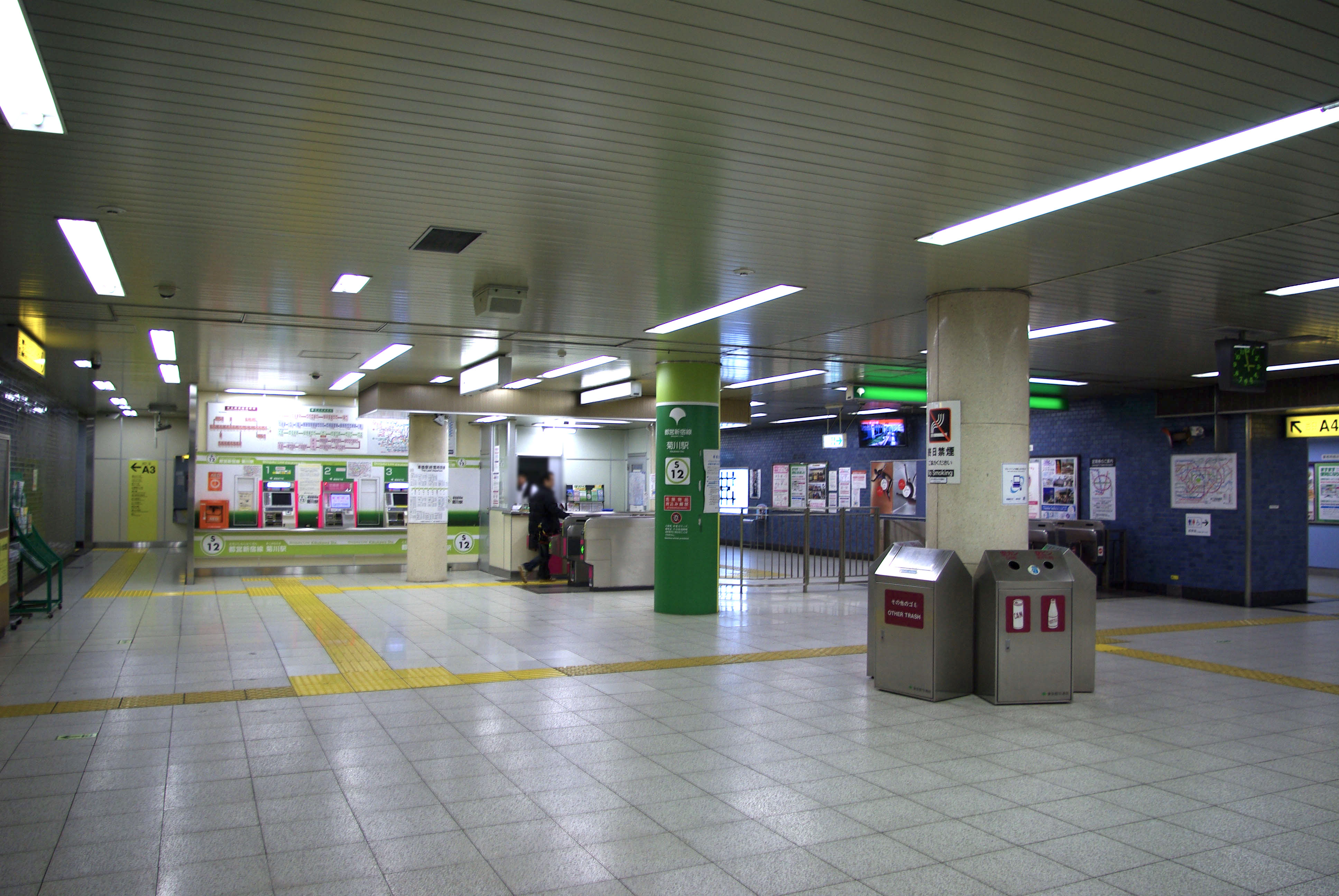 都営地下鉄新宿線菊川駅改札付近